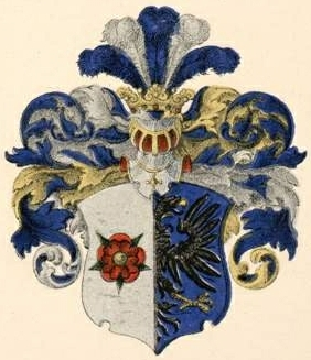 Transehe suguvõsa aadlivapp